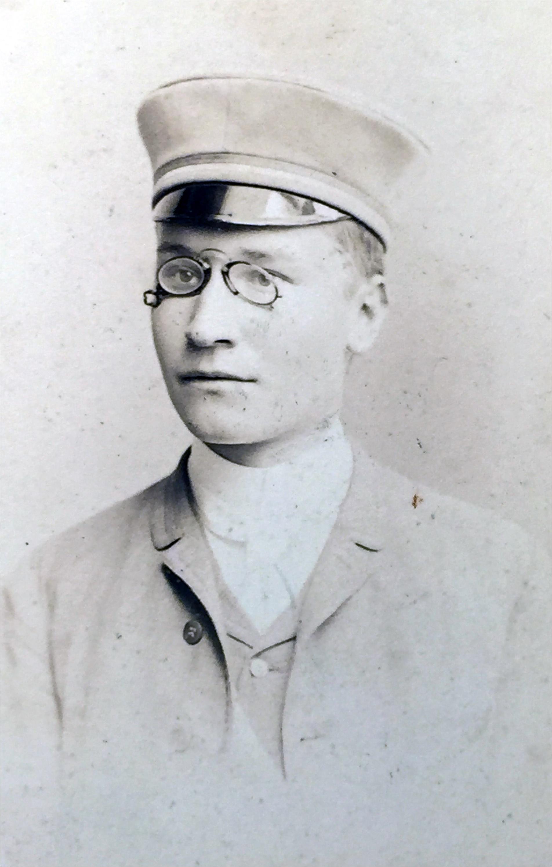 Porträtfotografie von Karl Kamm als Student in Leipzig